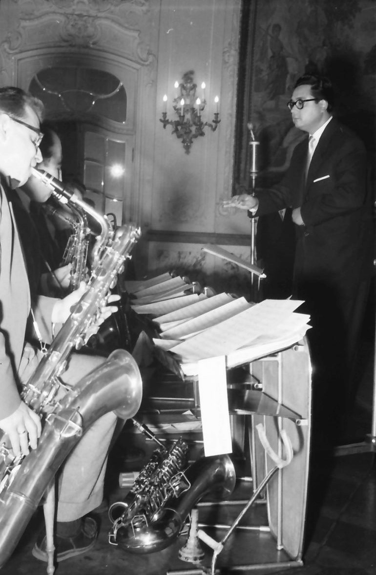 Donaueschingen: Donaueschinger Musiktage; Kurt Edelhagen spielt im Schloss des Fürsten zu Fürstenberg (Saxophon-Soli)